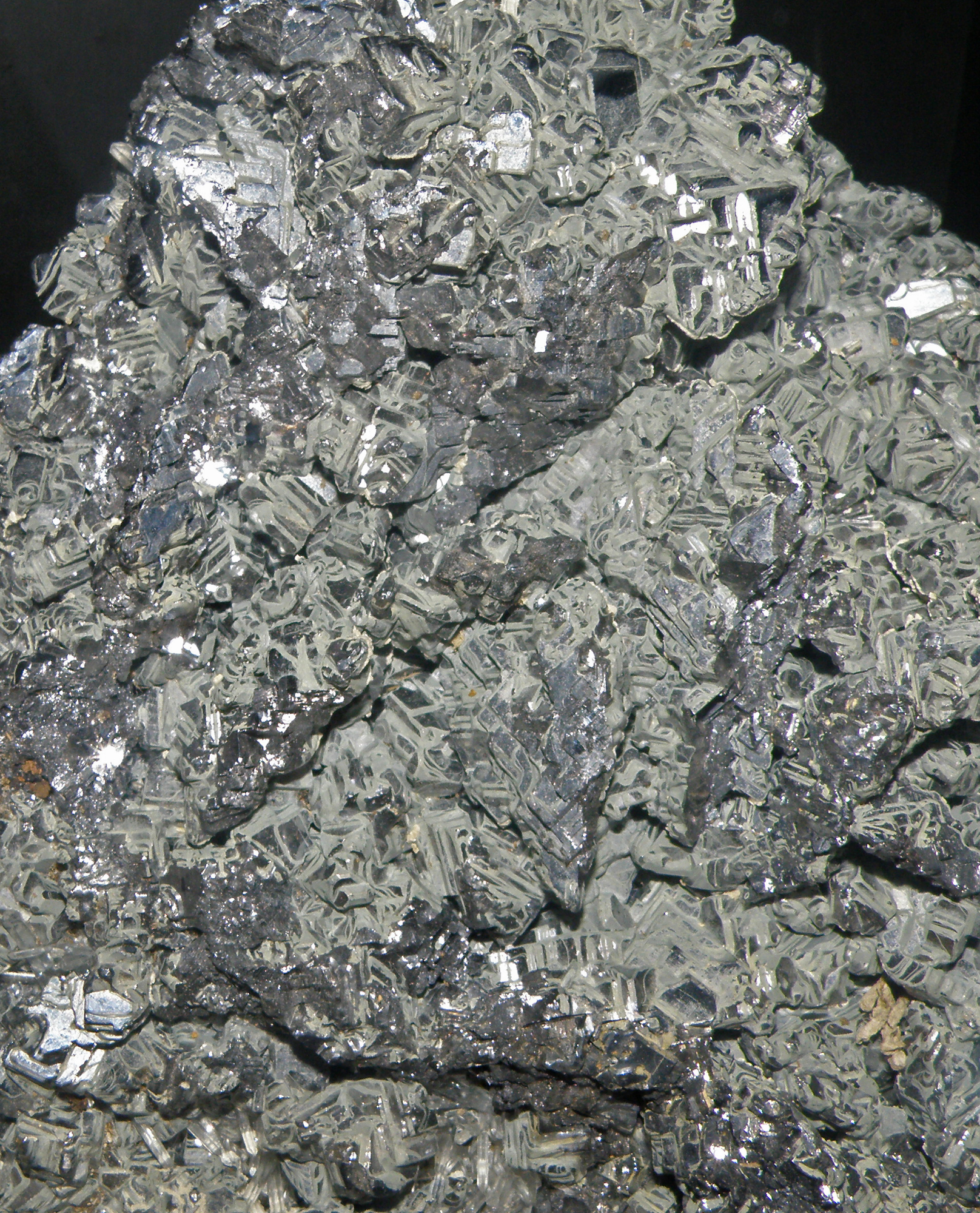 Galena